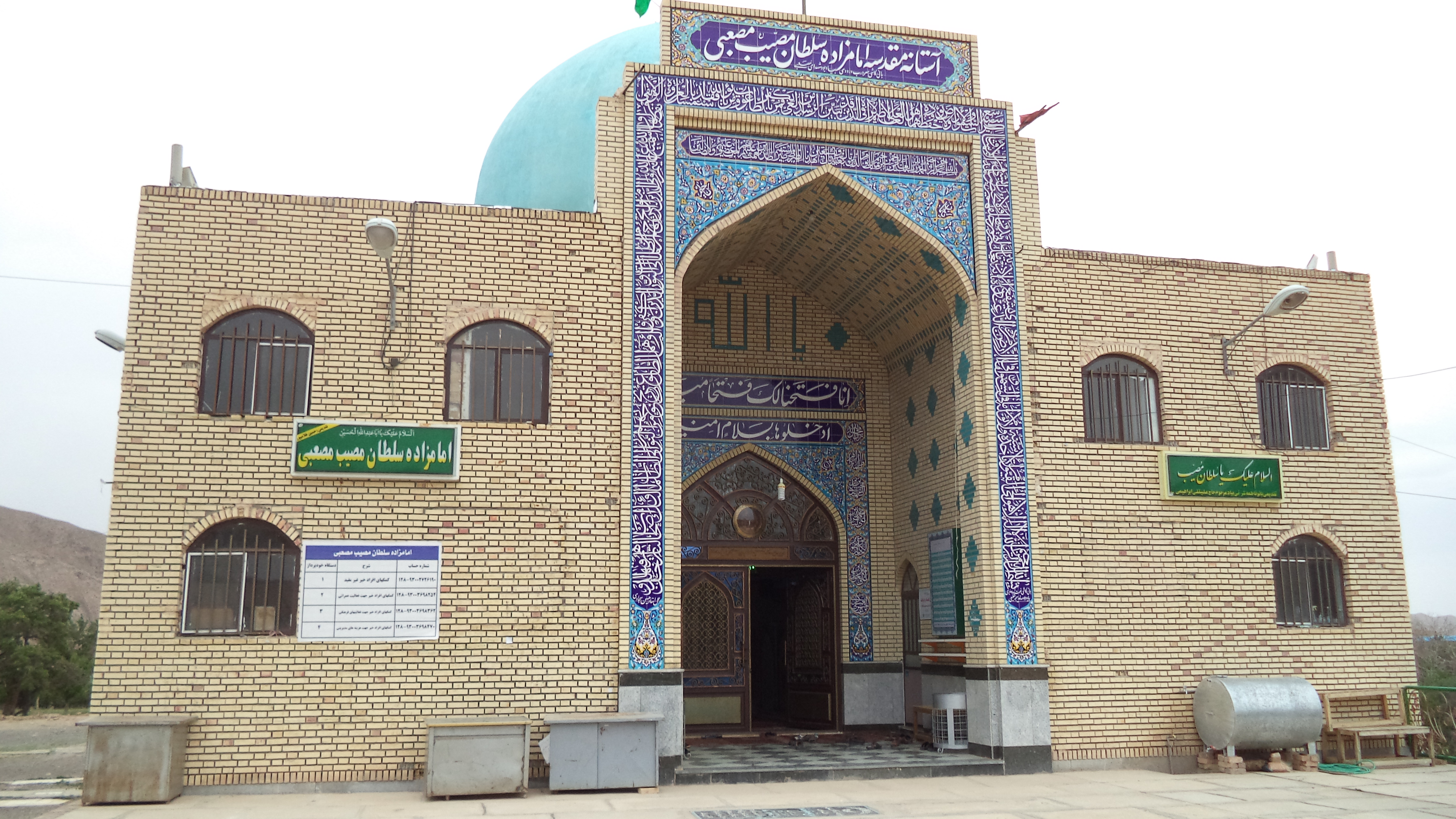 امام زاده سلطان مصیب مصعبی در روستای مصعبی از توابع شهرستان سرایان واقع شده است